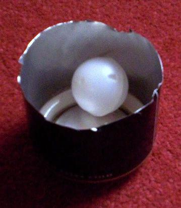 Beschreibung: Eine aufgeschnittene Dose Guinness mit Floating widget Quelle: Selbst fotografiert Fotograf oder Zeichner: User:Burntpunch Datum: Zülpich, 28. Dezember 2005 Description: A sliced can of Guinness with Floating widget Source: Taken by myself Photographer or drawer: User:Burntpunch Date: Zülpich, 28. December 2005